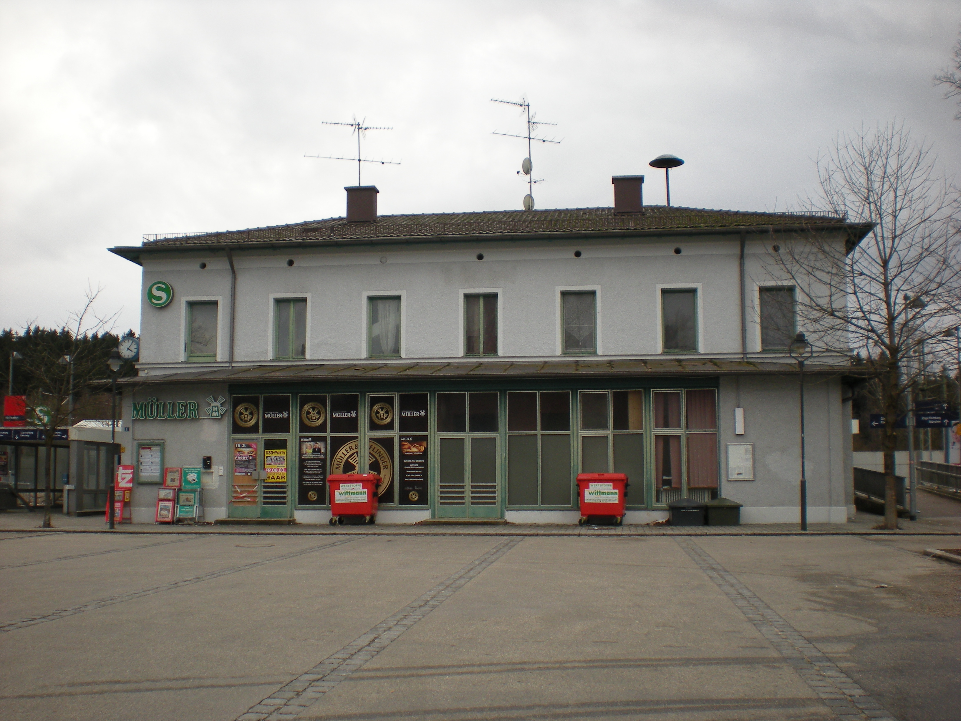 Empfangsgebäudes des Münchner S-Bahnhofs Kirchseeon von der Straßenseite